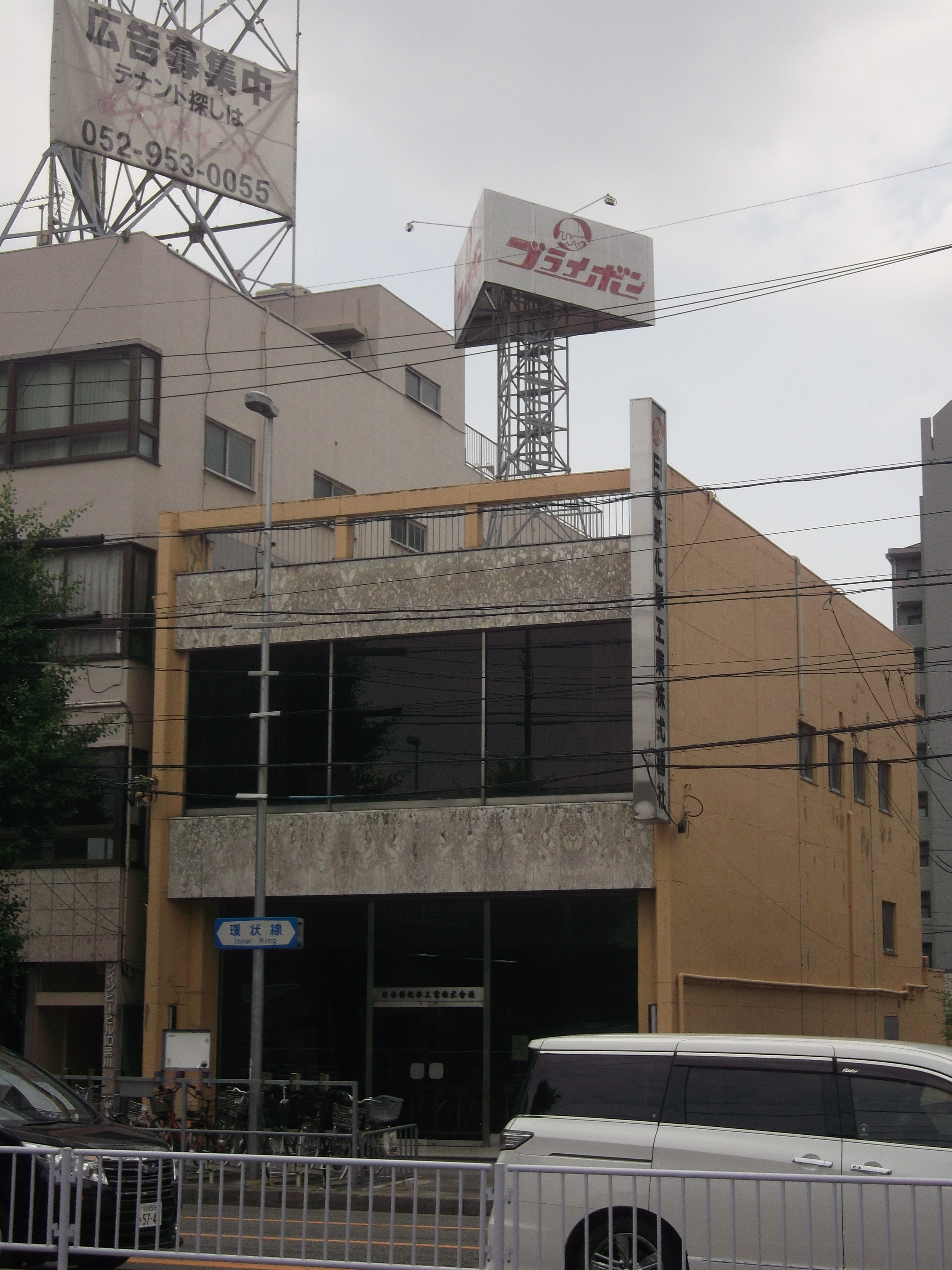 名古屋市北区志賀南通のブライボン本社を北側公道より写す